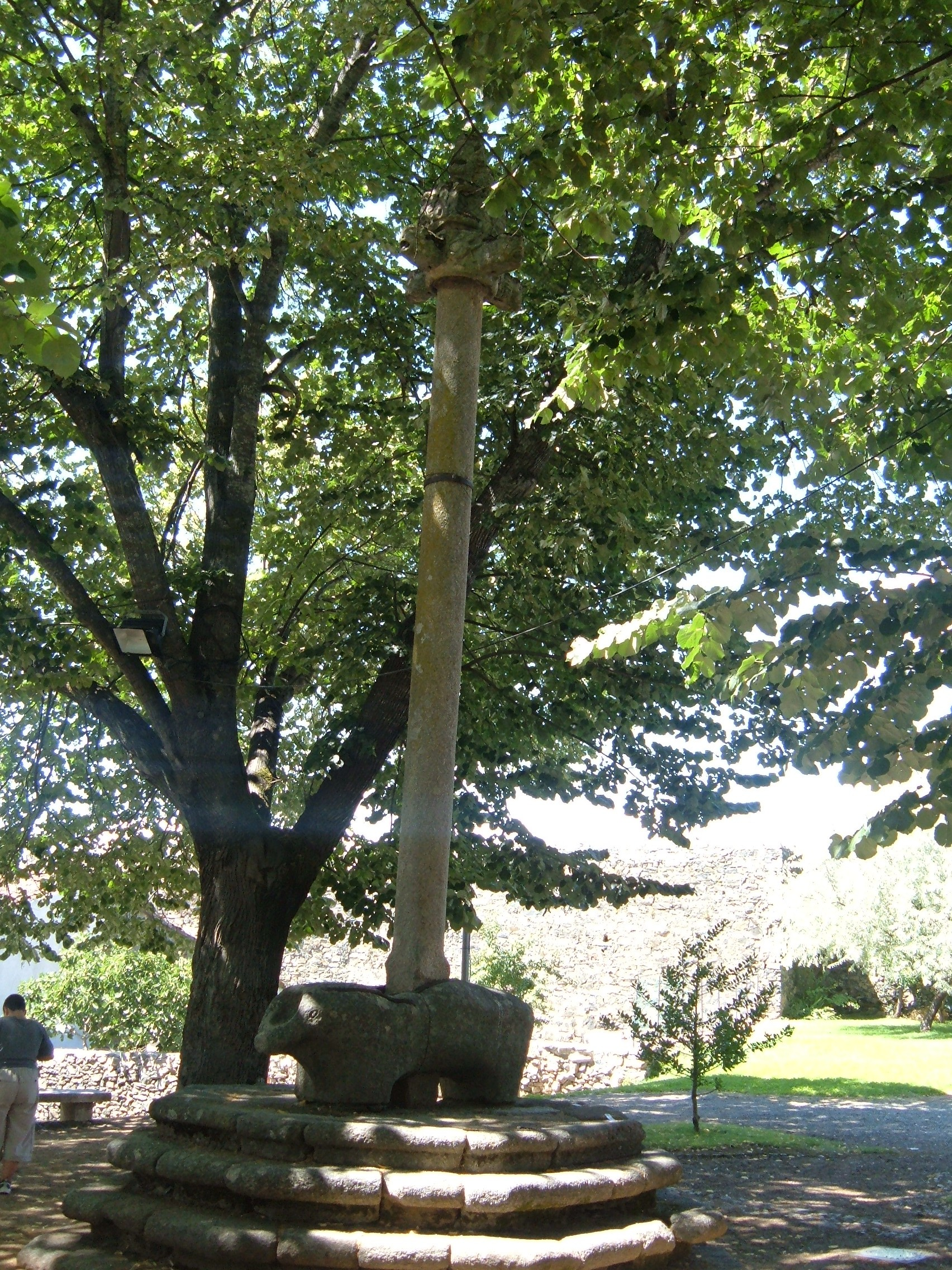 Pelourinho de Bragança. Na cidadela de Bragança. Portugal. Note-se a porca certamente pré-romana na qual foi cravado.